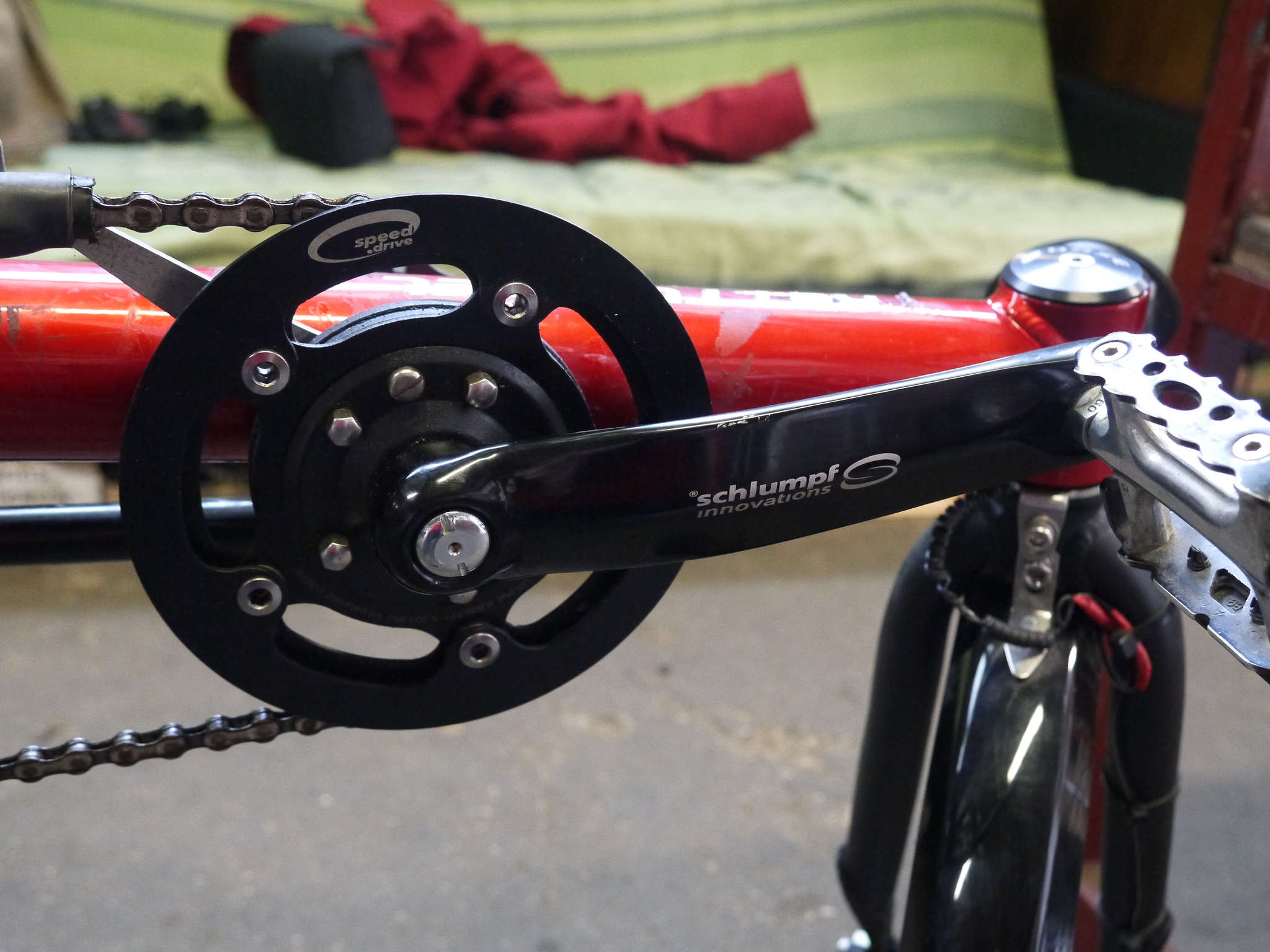 Pédalier planétaire Schlumpf sur Kettwiesel